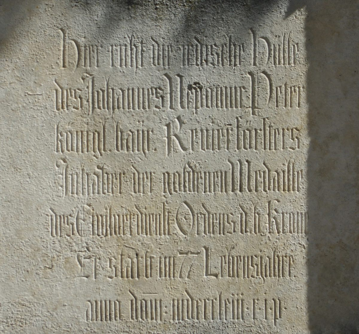 Inschrift Grabsäule Peter/Holnsteiner auf dem Friedhof St. Zeno in 83435 Bad Reichenhall